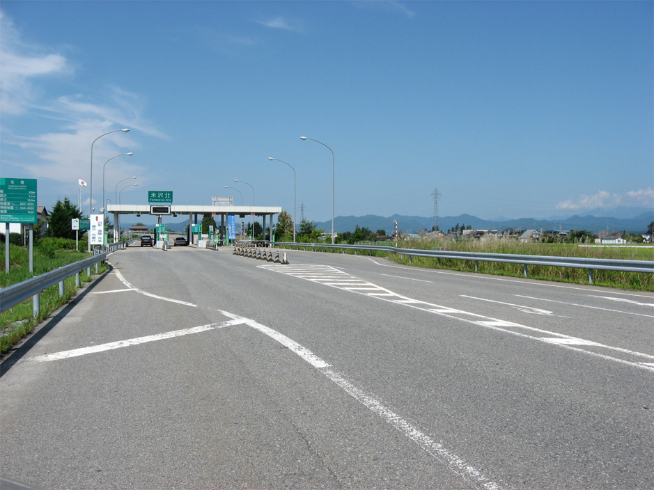 日本 東北中央自動車道 米沢北インターチェンジ